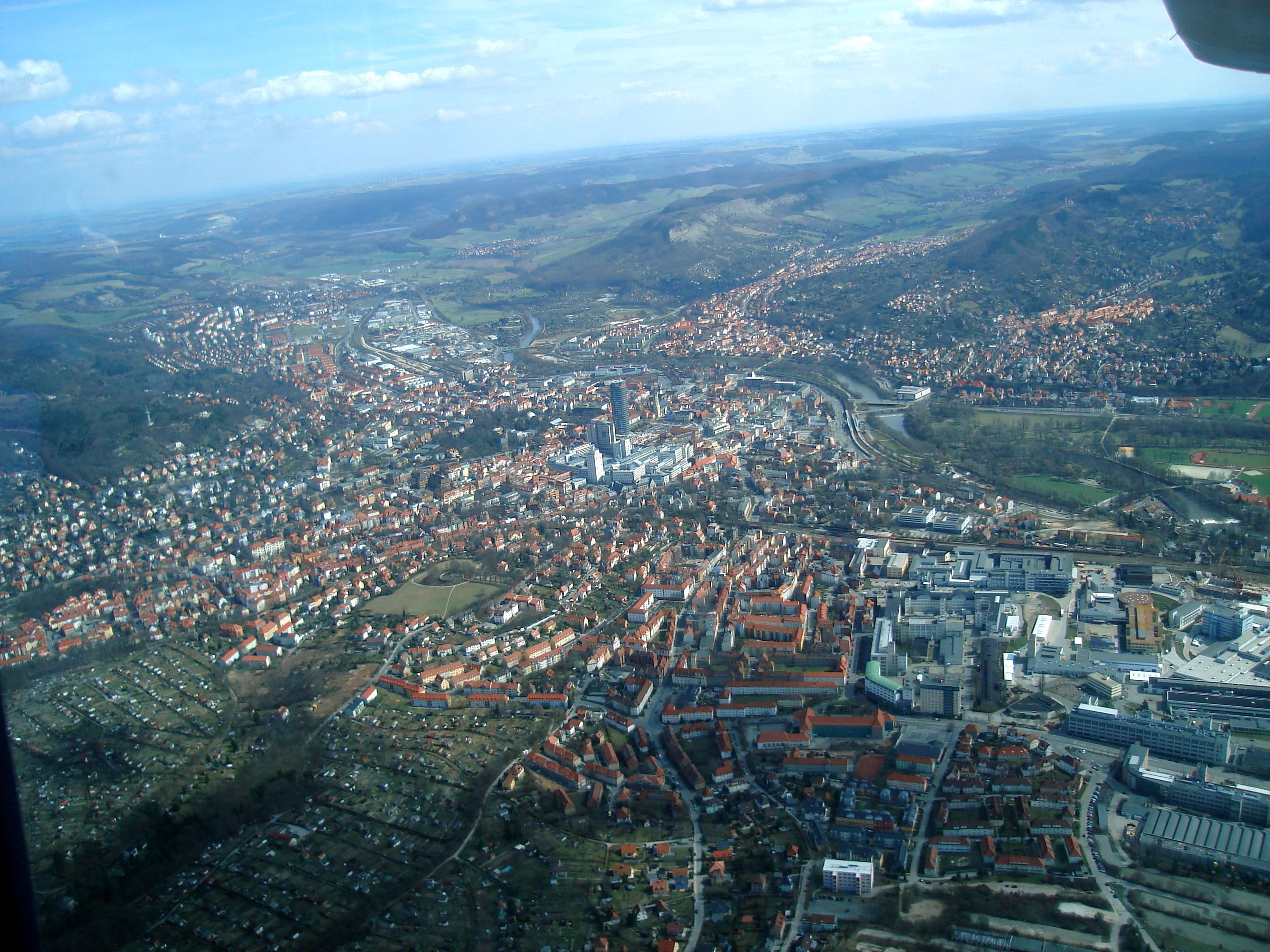 Das Zentrum Jenas aus der Luft